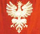 Orzeł biały na sztandarze powstańczym z Dąbrówki Wielkiej w 1919 r.; Muzeum w Tarnowskich Górach